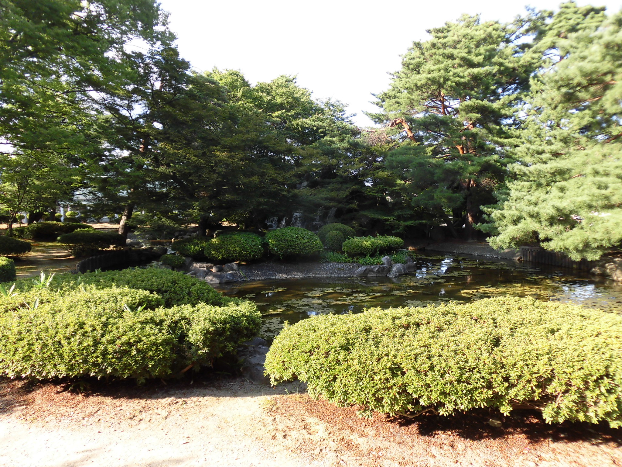 松ヶ池公園（白つつじ公園） ひょうたん池。山形県長井市神明町に所在。